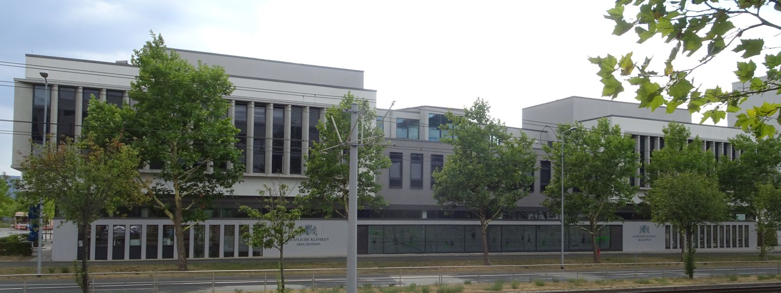 Ambulantes Reha-Zentrum der Gräfliche Kliniken Bad Driburg in Jena